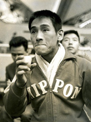 Yoshikatsu Yoshida, 1964 Olympics